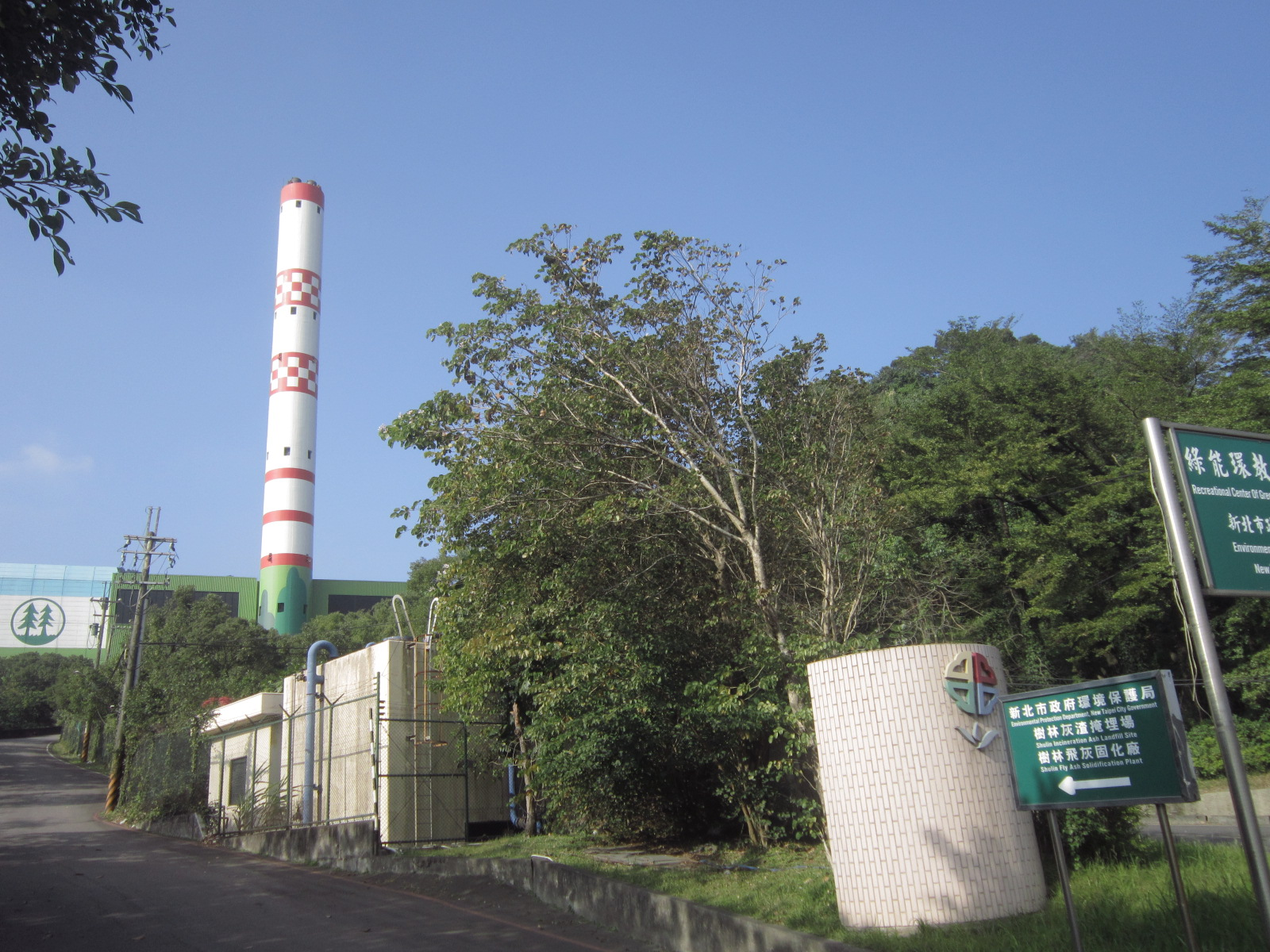 中文（台灣）: 新北市政府環境保護局樹林垃圾焚化廠，位於新北市樹林區中山路三段212號。